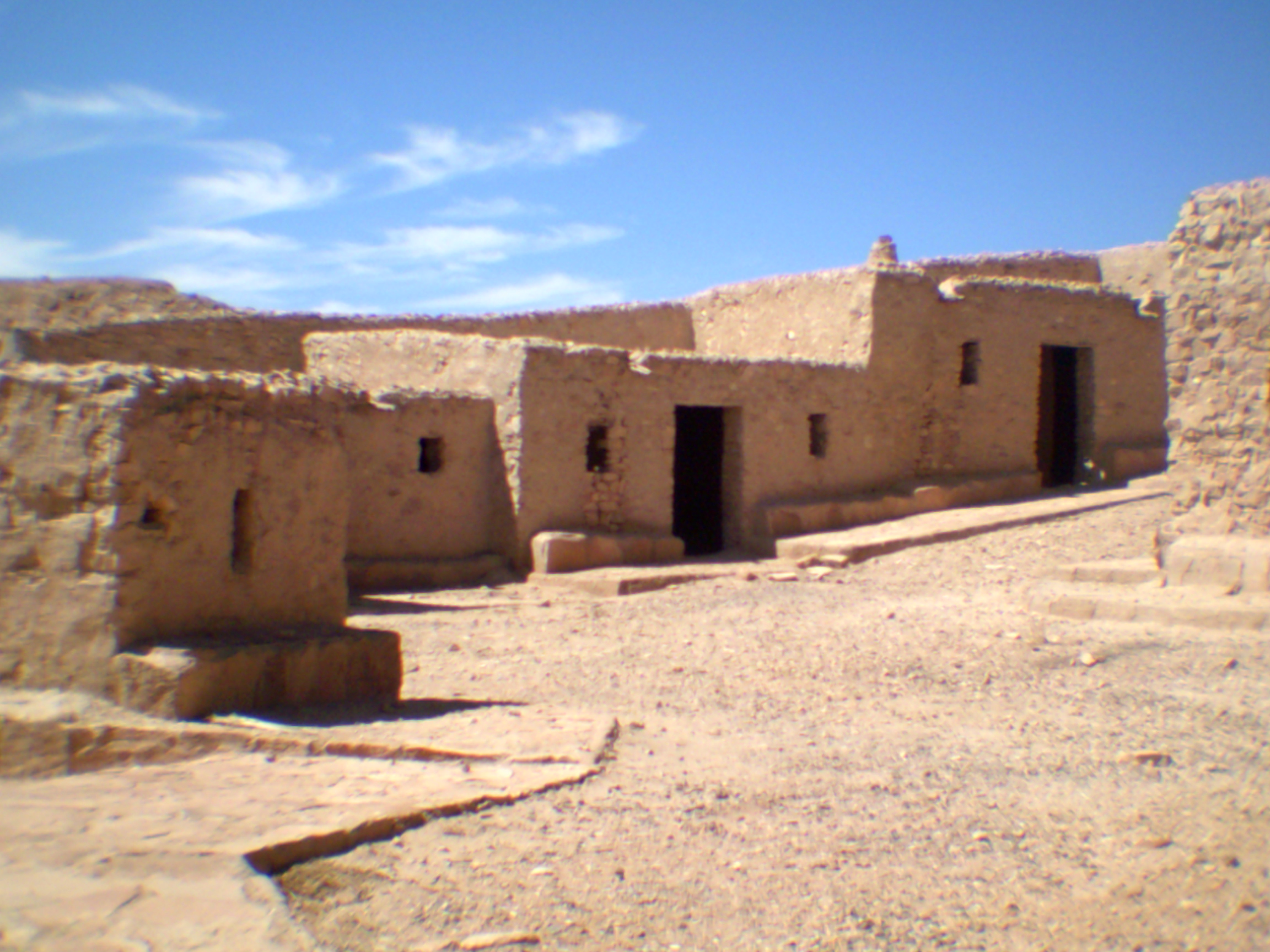 غرف القصر القديم والتي عددها 44 غرفة اضافة الى غرفة السلطانة بنت الخص